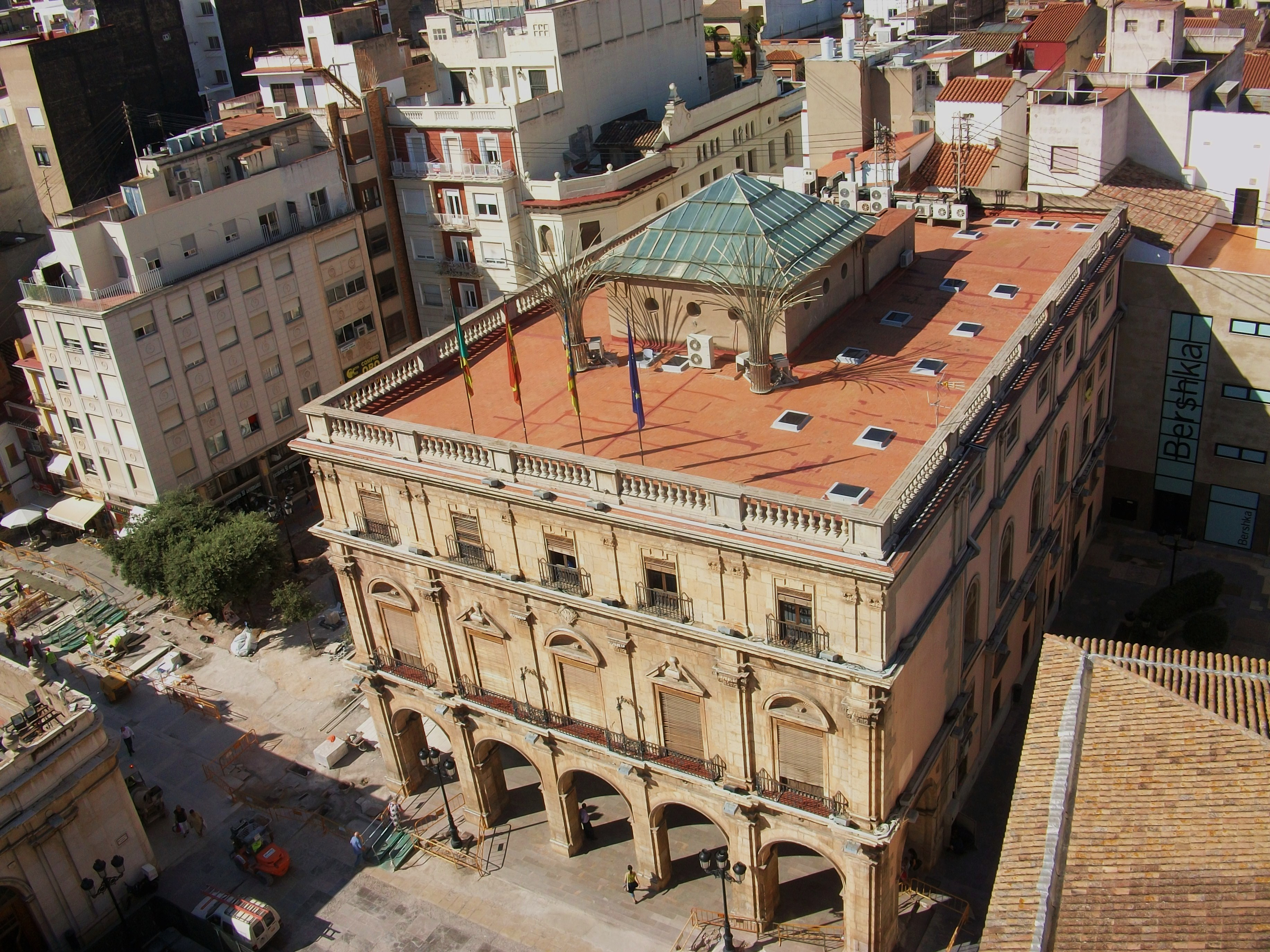 Ajuntament de Castelló, vist des del Fadrí.